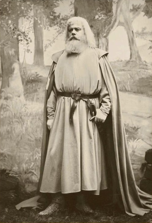 Emil Scaria als Gurnemanz in Parsifal, Bayreuth 1883